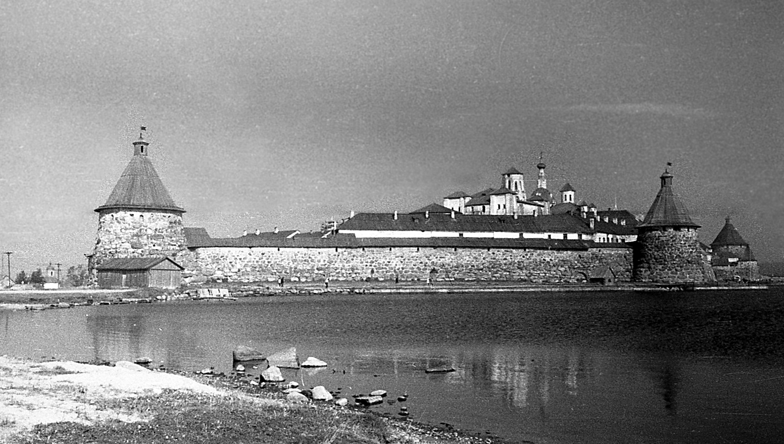 Святое озеро и монастырь с Северо-Востока.